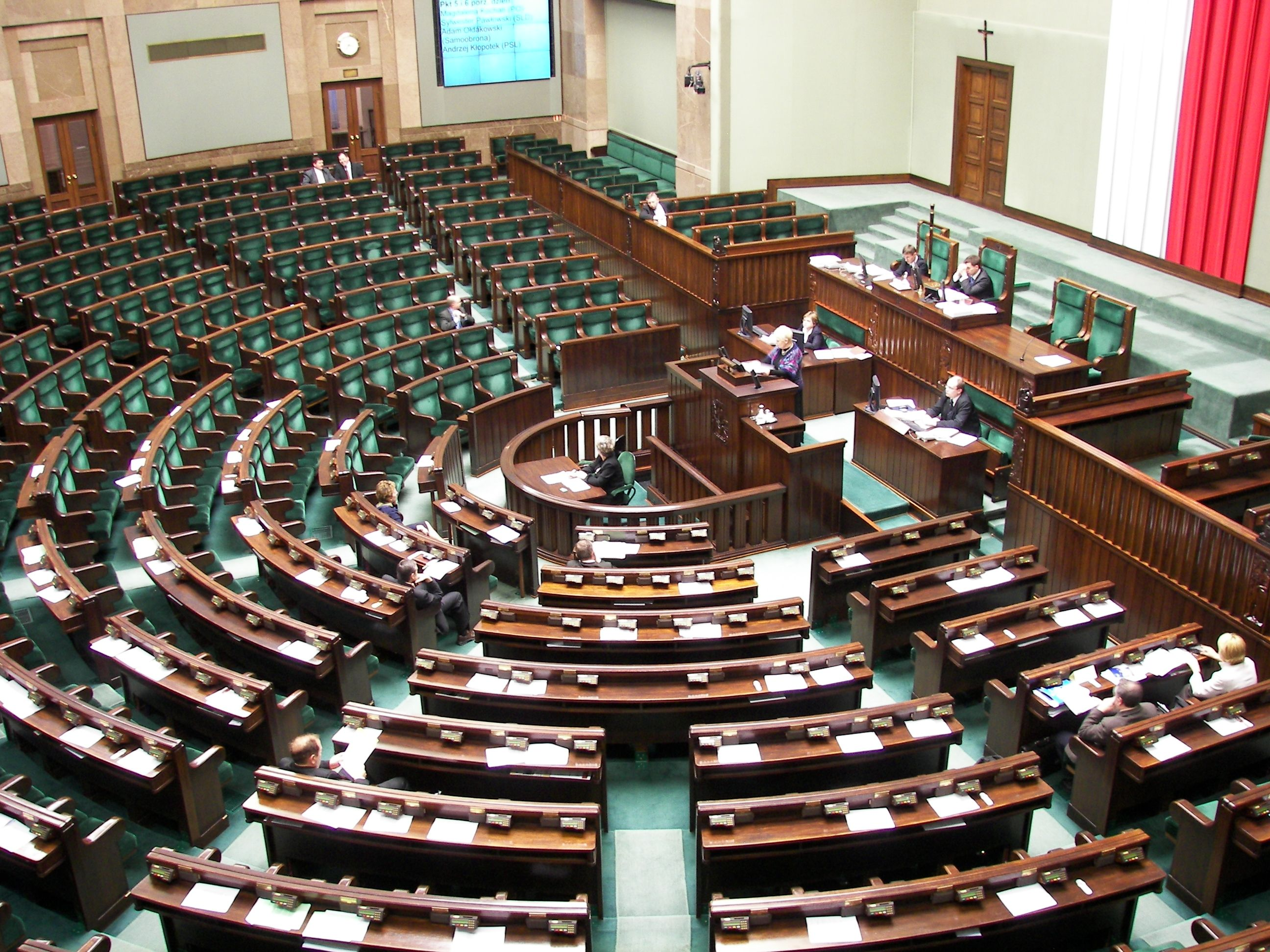 Sejm RP, sala plenarna, zdjęcie wykonane 24 stycznia 2007 roku, autor: Piotr VaGla Waglowski